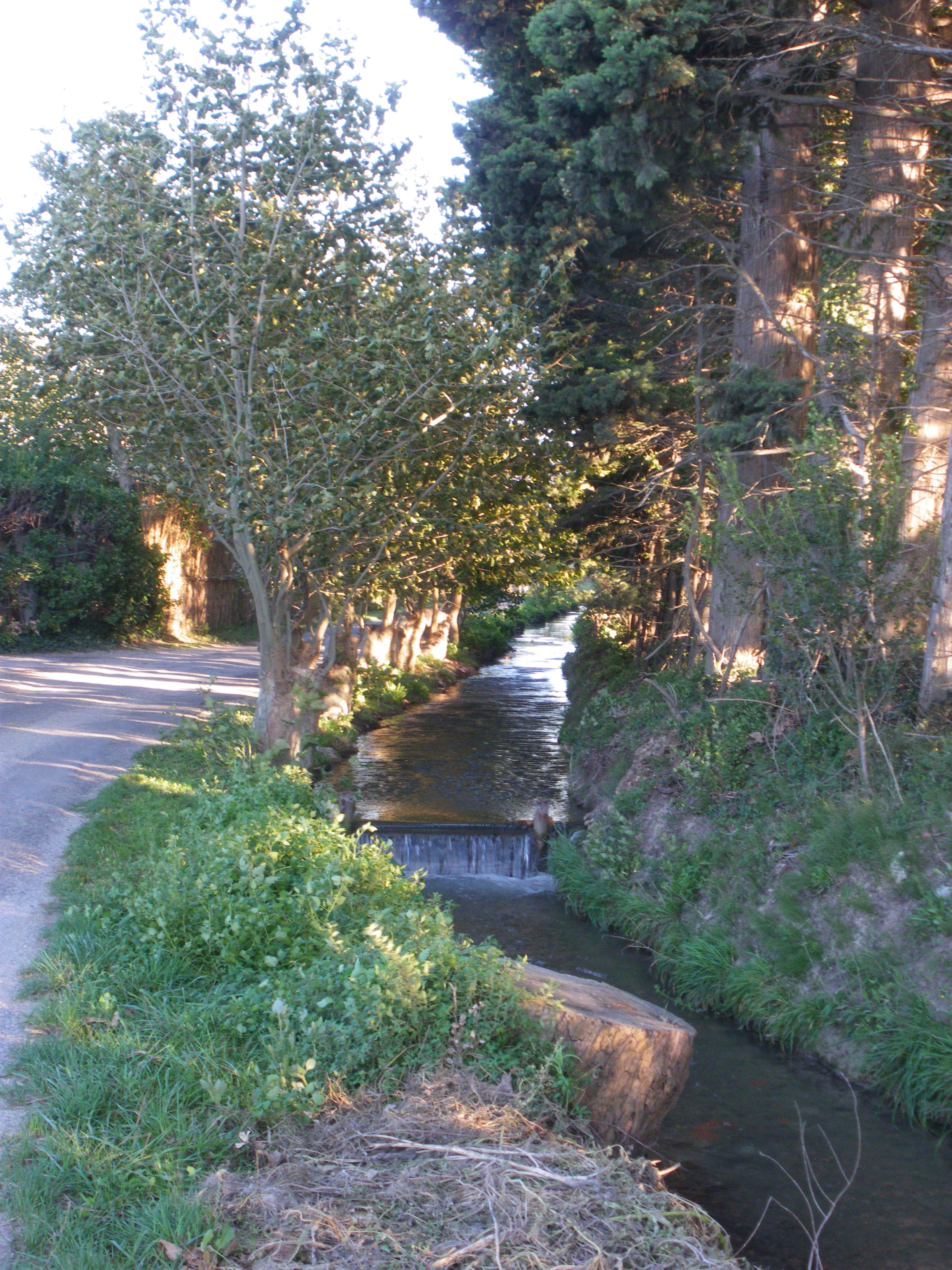 Réal de Montclar à Thouzon, Le Thor, Vaucluse, France